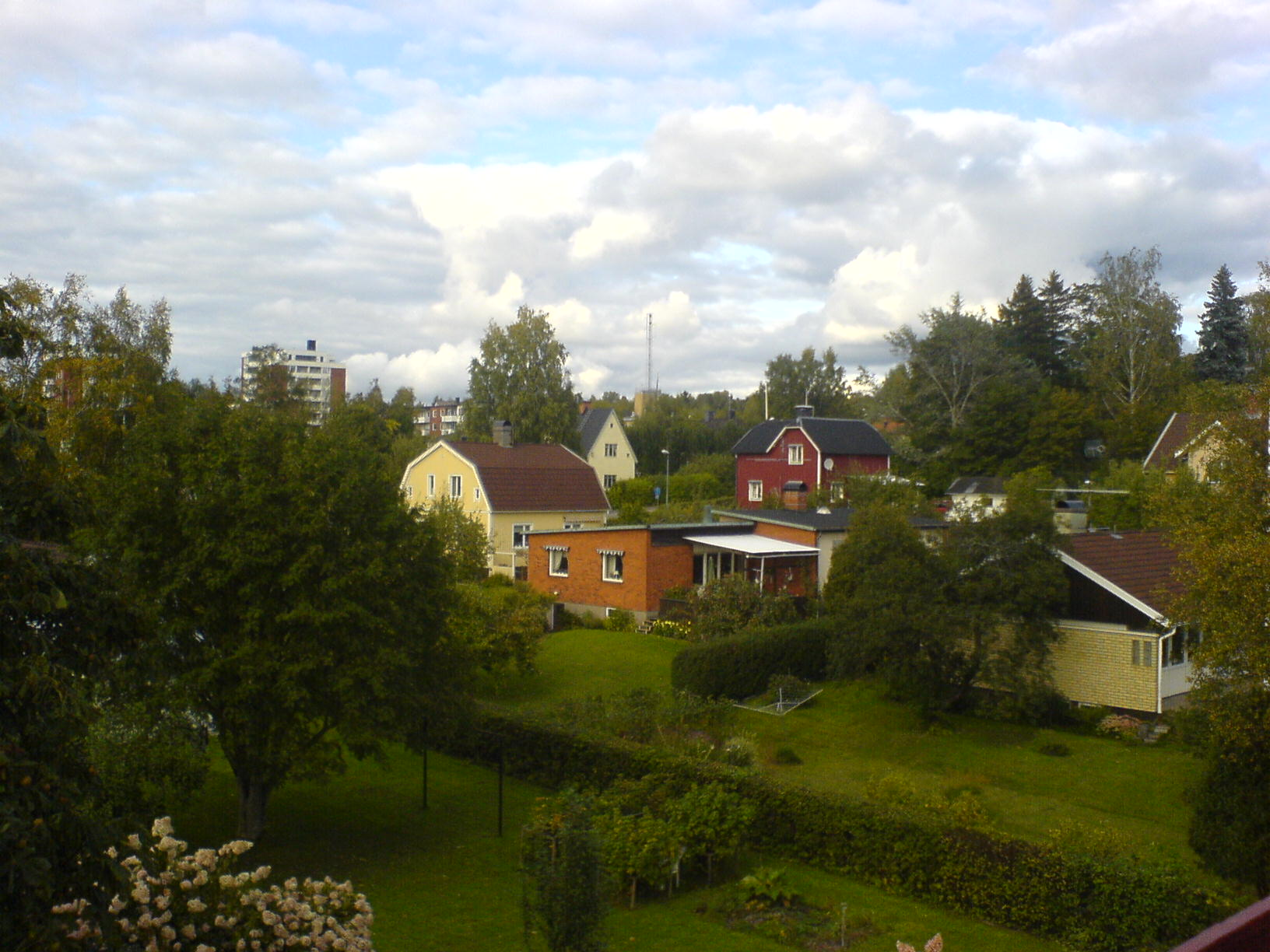 Neighborhood in Karlskoga, Sweden